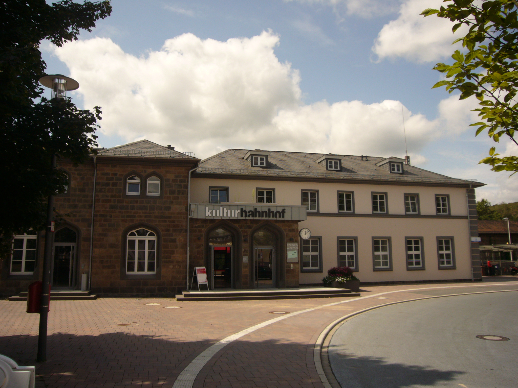 Kulturbahnhof 57223 Kreuztal, Deutschland